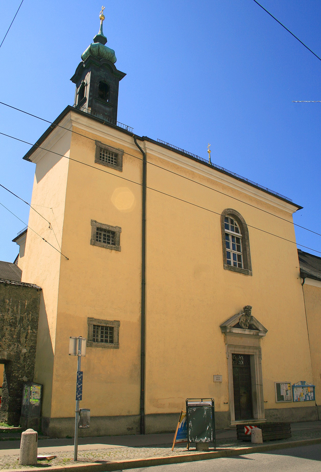 Loretokirche